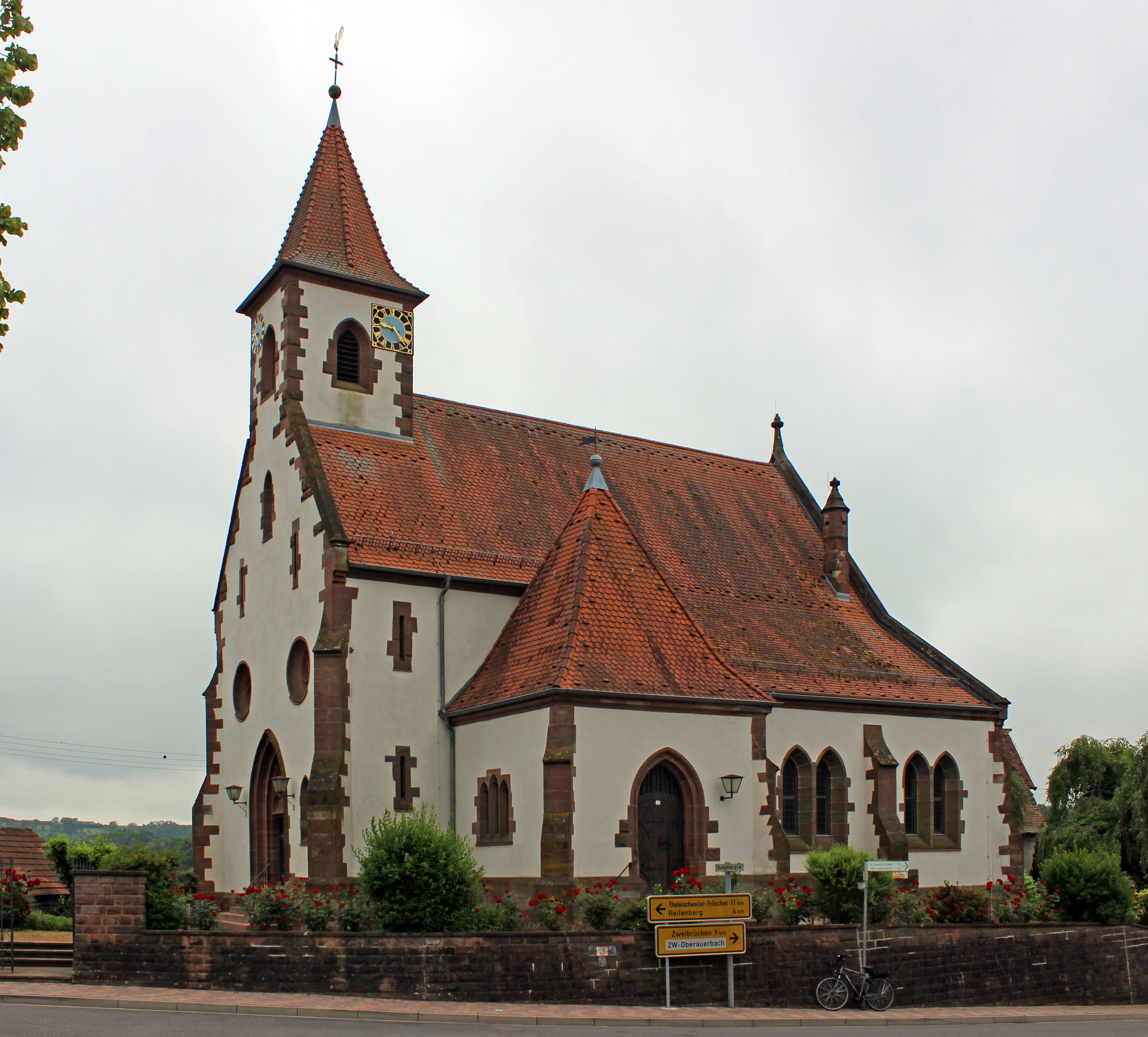 Evangelische Kirche in Battweiler, Verbandsgemeinde Zweibrücken-Land, Landkreis Südwestpfalz, Rheinland-Pfalz. Zweischiffiger neugotischer Bau, erbaut 1906/07; Gotischer Chor, wohl aus der zweiten Hälfte des 13. Jahrhunderts.